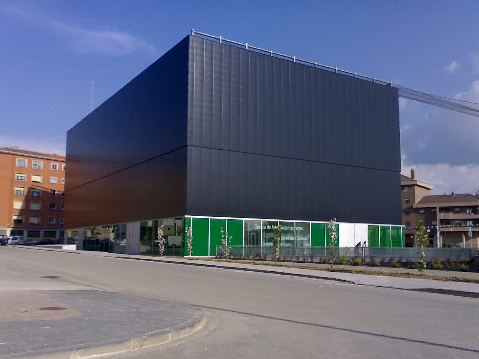 Uharteko Arte Garaikide Museoa.